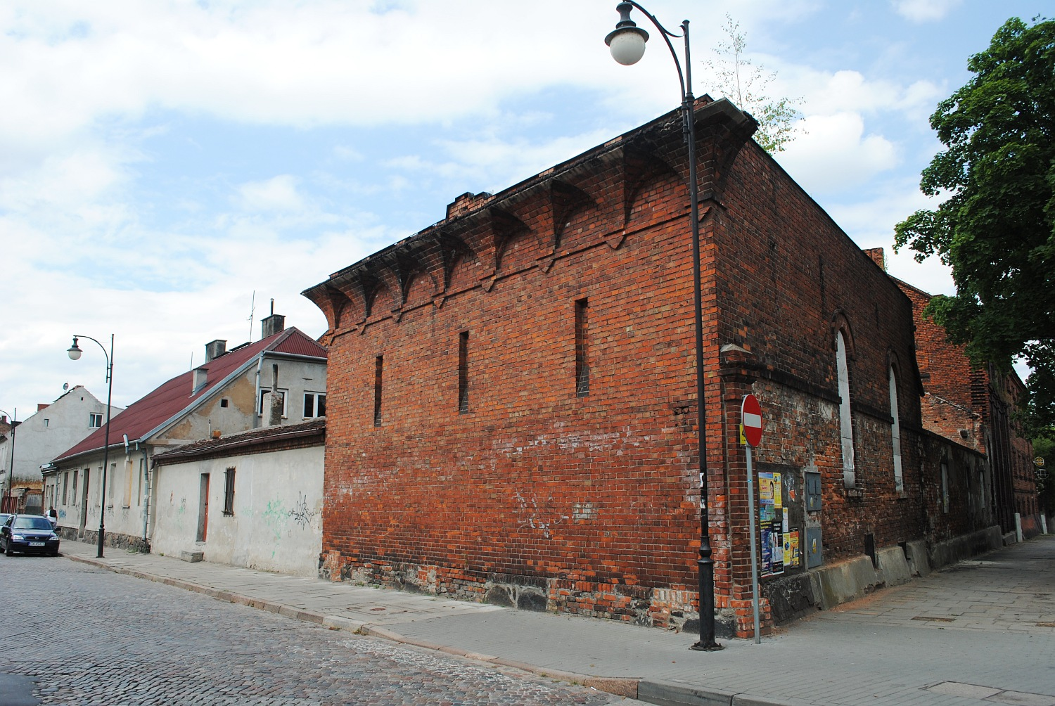 Browar Bojańczyka we Włocławku - magazyn nr 3 oraz Dom Zarządcy